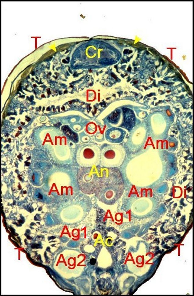 Coupe transversale d'abdomen d' Argyrodes argentatus avec les glandes à soie